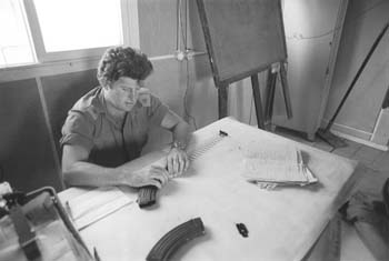 רס"ן יורם יאיר.